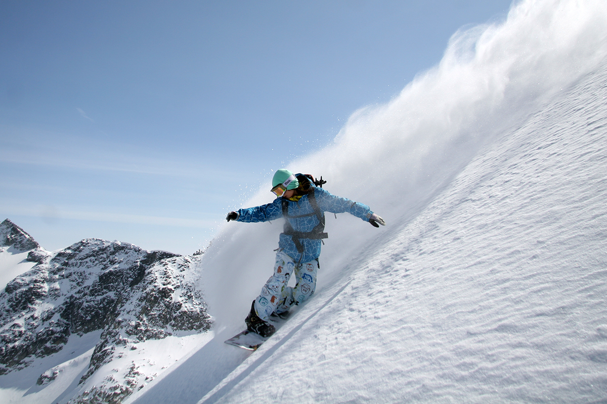 スノーボードしている風景